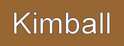 Kimball destination sign.